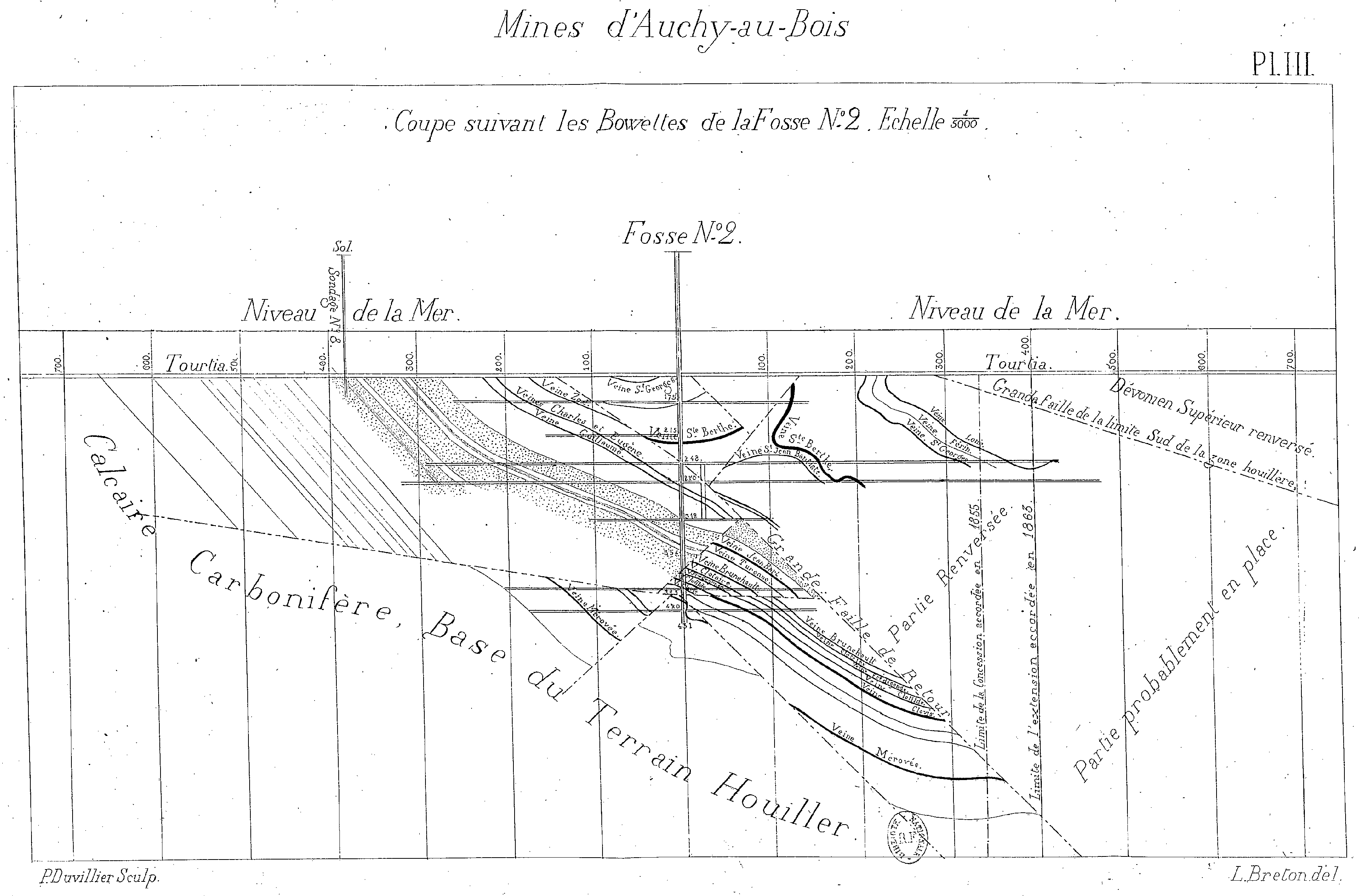 Compagnie des mines d'Auchy-au-Bois.